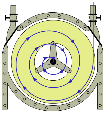 Dijagram Tesline turbine stvoren na osnovu izvornog Teslinog patenta US1061206A. Spirala predočuje smjer kretanja fluida unutar turbine.